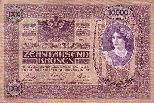 10000 Austro-Hungarian Krone/korona (1918) - obverse